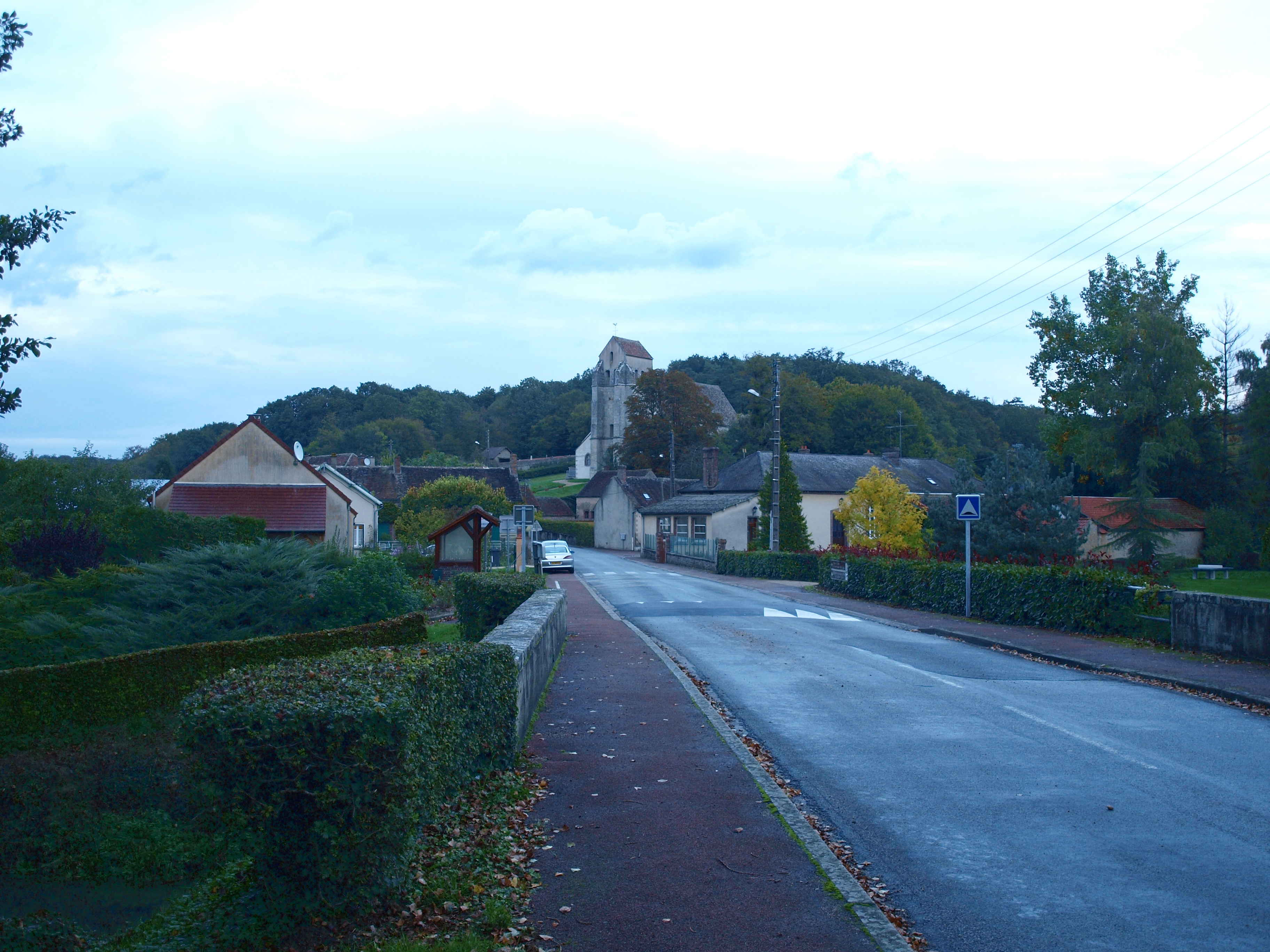 Chevannes (Loiret, France), une partie du village vue depuis le pont